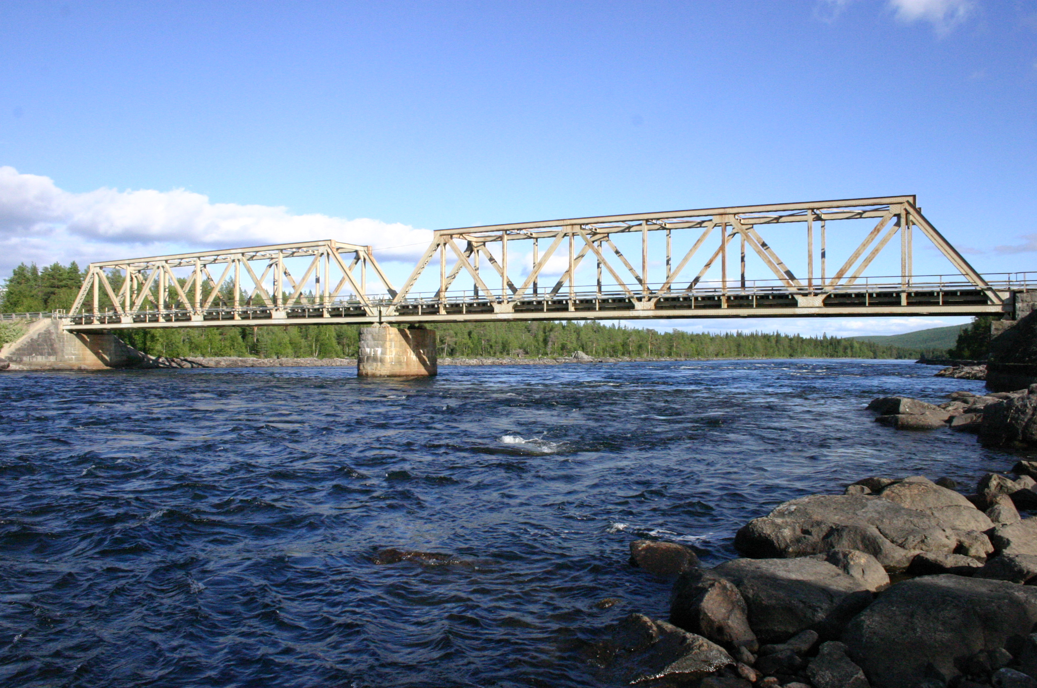 Brücke über den Piteälv 13.08.04